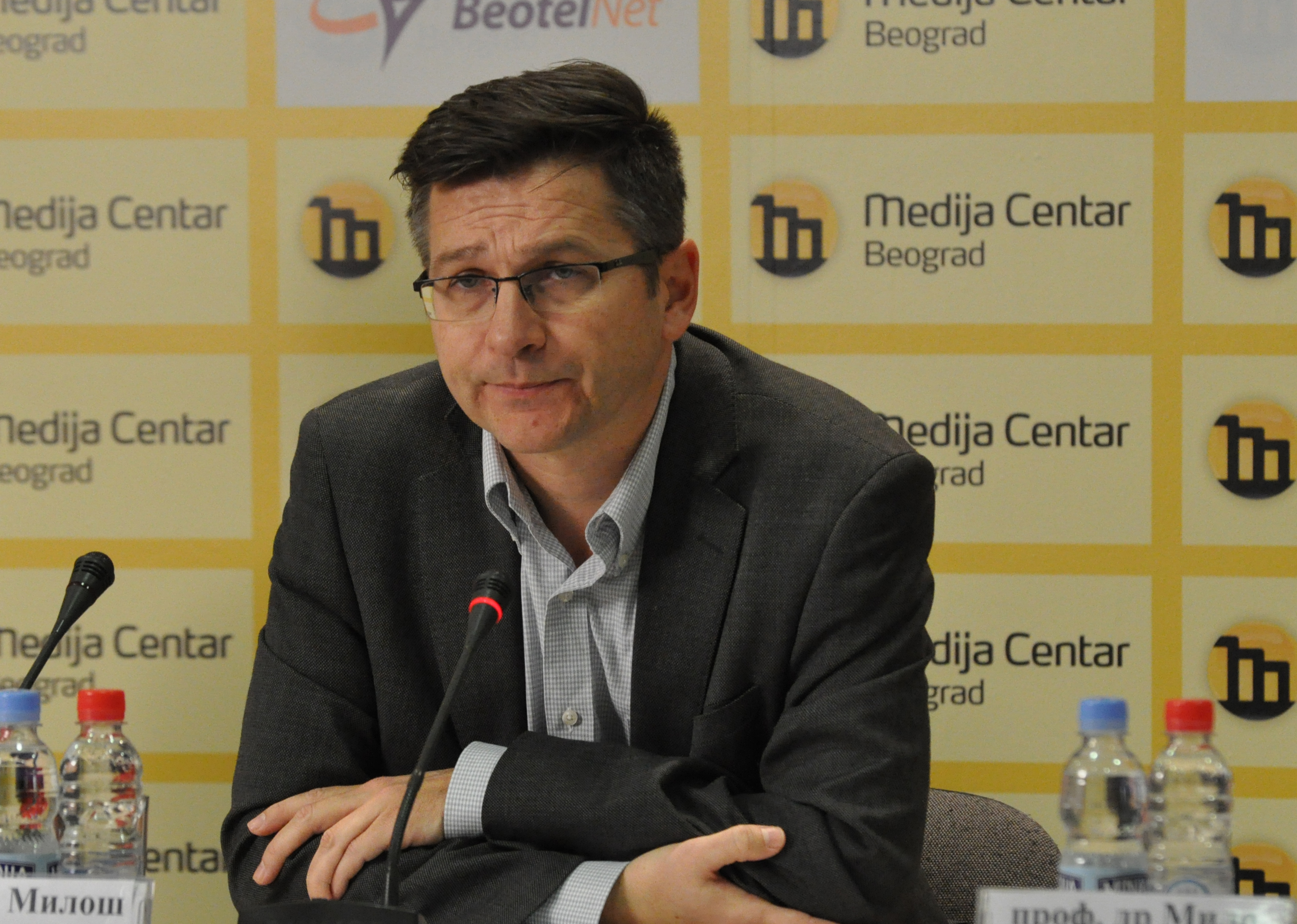 Милош Ковић српски историчар